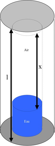 Schéma du Ludion.